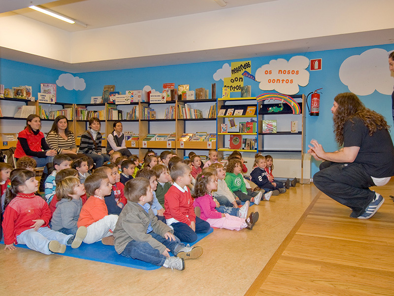 Visita de un grupo de educación infantil a la Biblioteca Municipal Forum Metropolitano de A Coruña